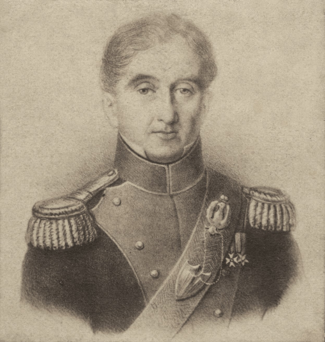 Portret płk Marcina Tarnowskiego (1778-1862), autor jest nieznany lub jest nim K. Domański, gdyż portret ten był wykorzystany w portretach zbiorowych oficerów wojsk napoleońskich wykonanych przez K. Domańskiego, (portret ten różni się naniesieniem nań nakrycia głowy i był publikowany m.in. w: Robert Bielecki „Encyklopedia wojen Napoleońskich”, Publisher: Wydawnictwo Trio, Warszawa, 2002, strona nienumerowana); został też sfotografowany przez nieznanego fotografa i wydany z okazji śmierci Marcina Tarnowskiego w roku 1862 lub w roku następnym 1863 (odbitkę można zobaczyć w: Cyfrowej Bibliotece Narodowej – Polona z komentarzem co do praw autorskich: „Prawa: Domena Publiczna. Wolno zwielokrotniać, zmieniać i rozpowszechniać oraz wykonywać utwór, nawet w celach komercyjnych, bez konieczności pytania o zgodę.”).